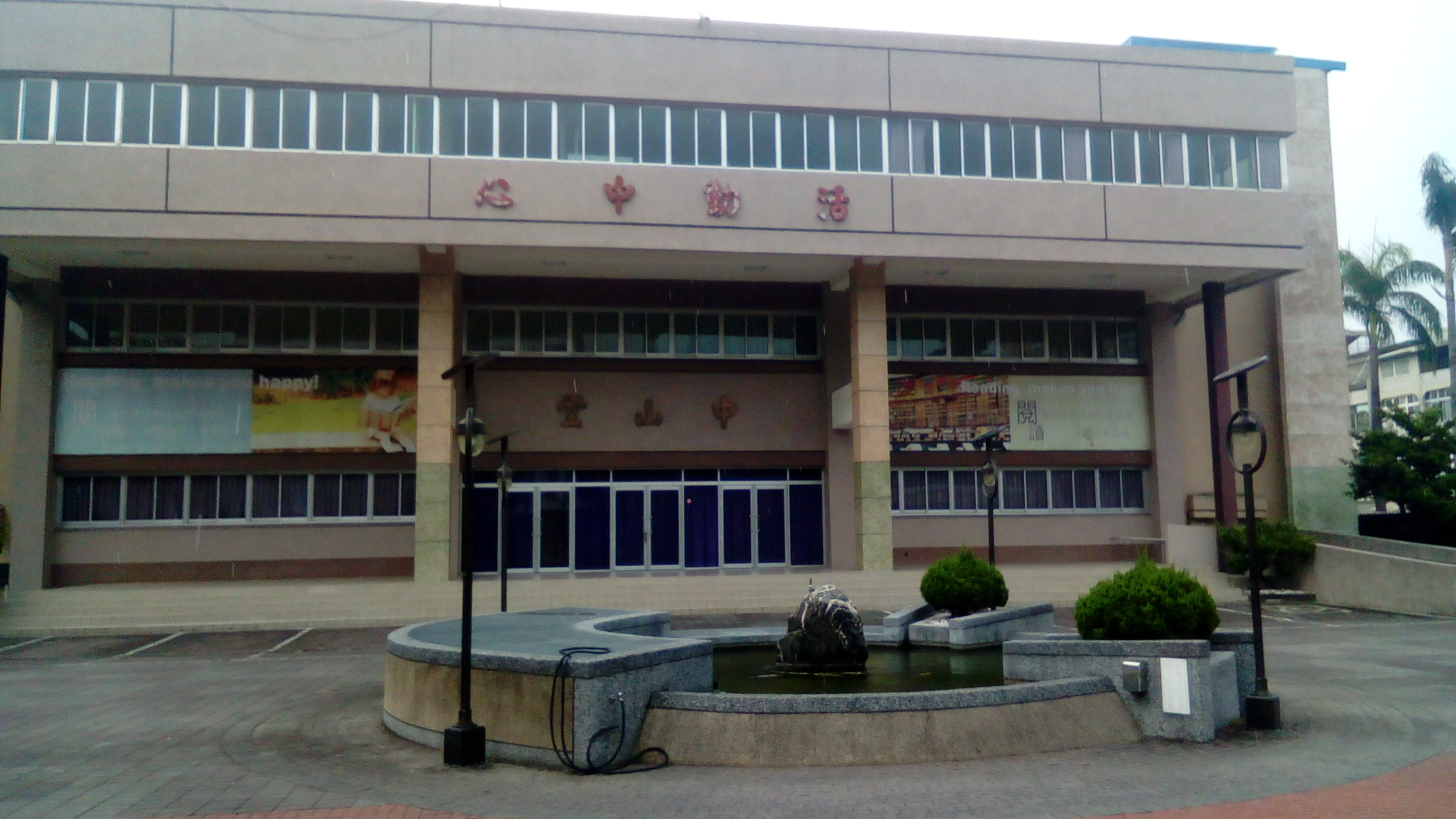 事項宣導、重要集會、迎新、講座接於此處舉行